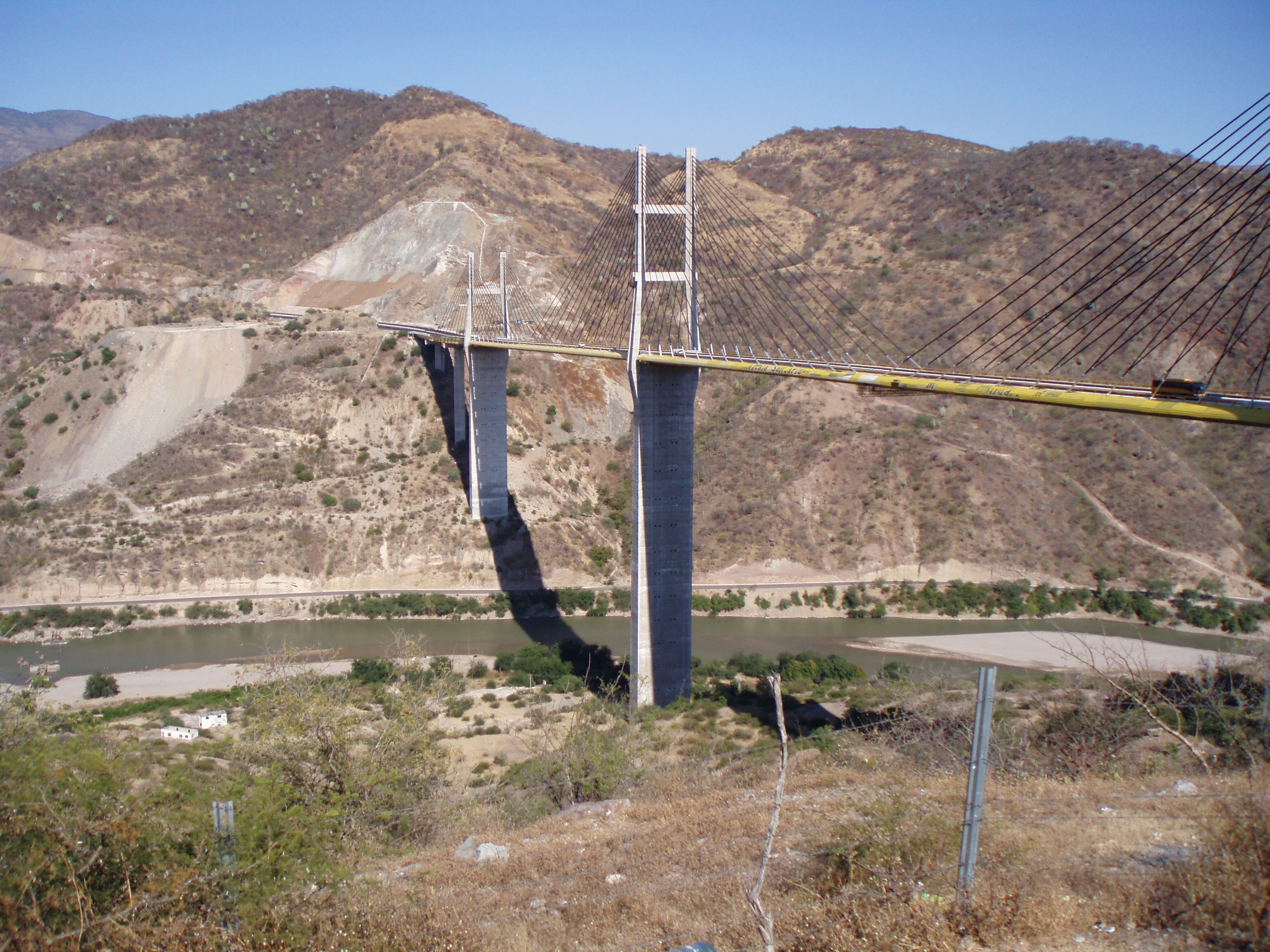 Puente Mezcala, sobre la caretera Cuernavaca Acapulco, Guerrero, Mexico.